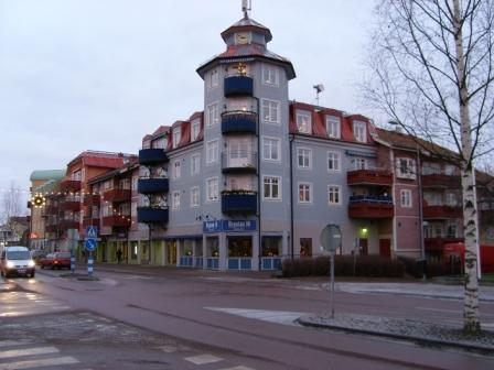 Das Zentrum von Leksand